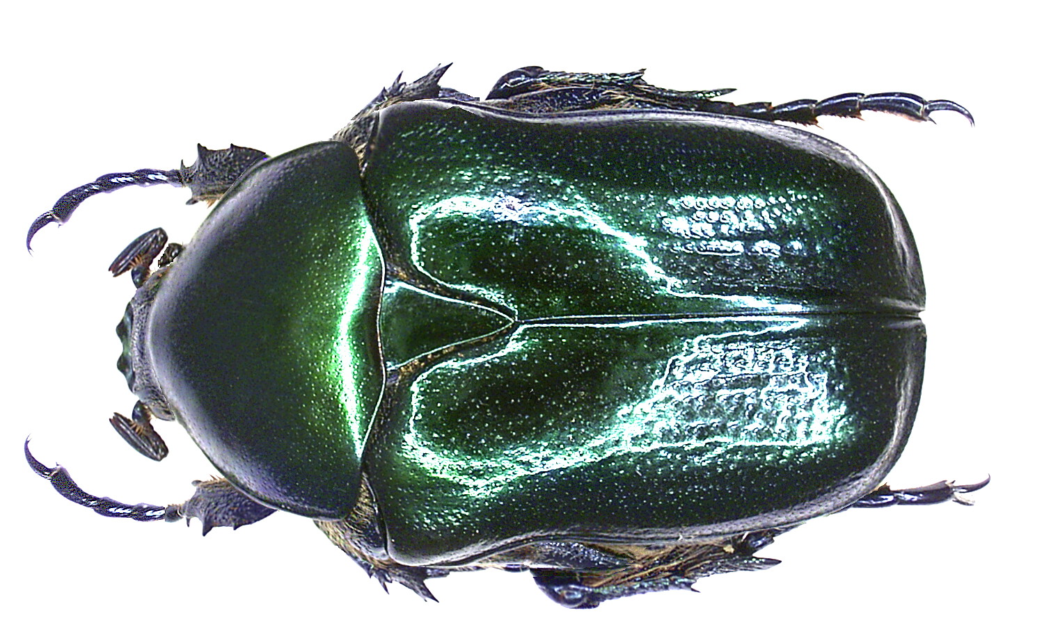 Familie: Scarabaeidae Grösse: 21 mm Fundort: Türkei, Mahmutlar leg. A.Skale, 2004; det. Rößner Foto: U.Schmidt, 2007